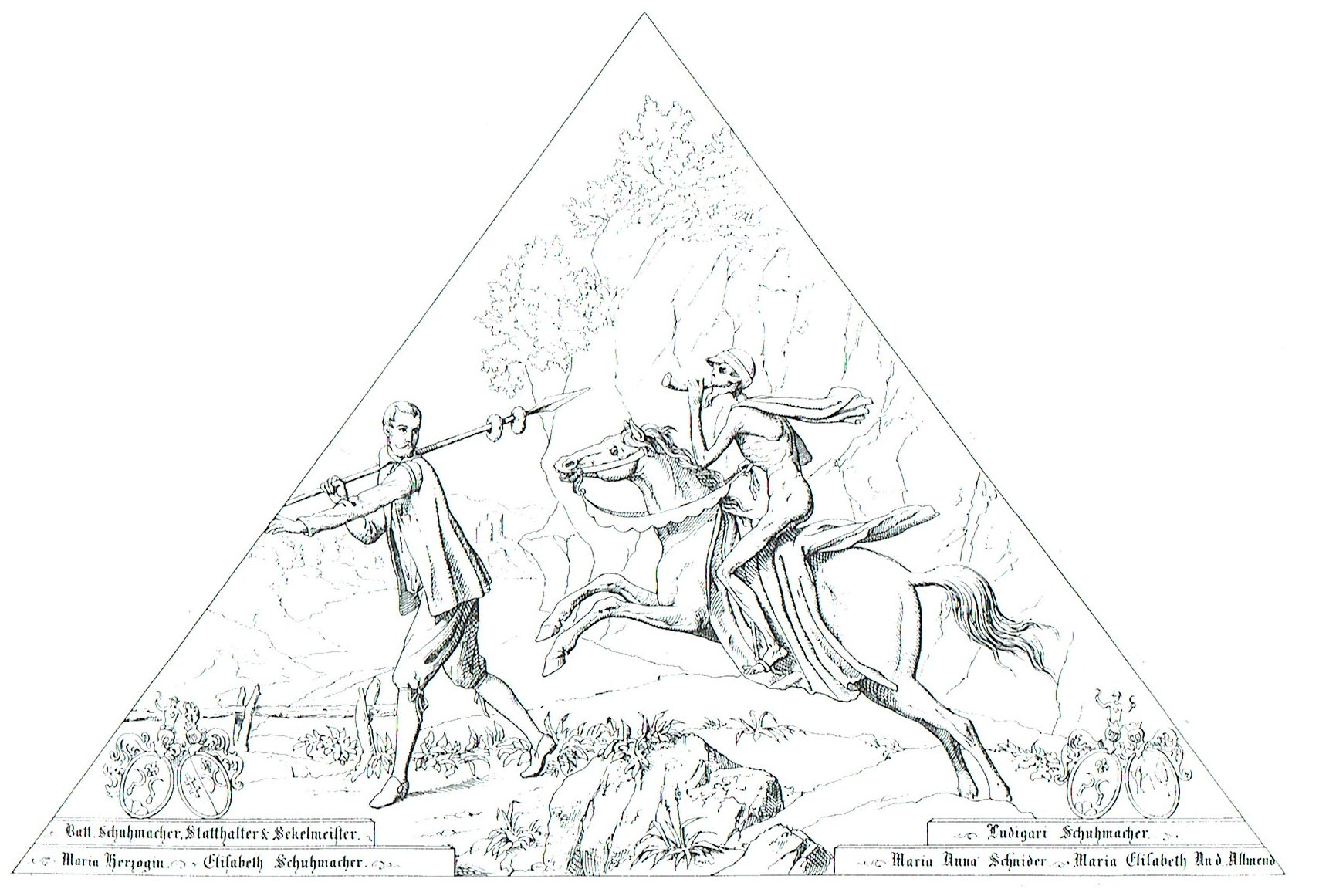 Tafel 60, Der Bote (Original verschollen) Both, was ist Neues, was ist die Sag? Eyl nit, dann ich auch Bothschaft trag, Mein und dein Brief die lauten gleich, Dass du noch heut wirst seyn ein Leich.